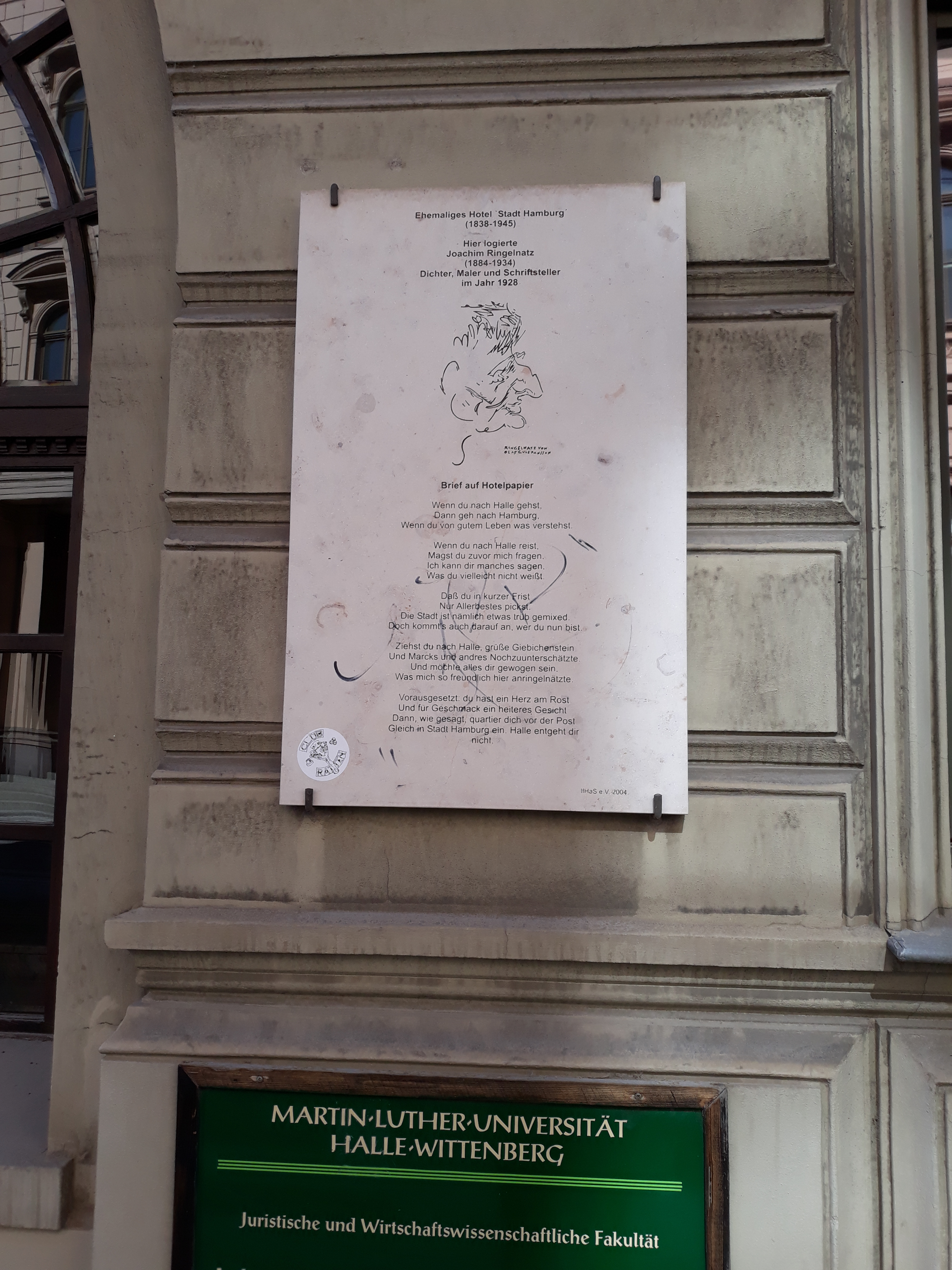 Gedenktafel für den deutschen Dichter, Kabarettisten und Maler Joachim Ringelnatz in Halle (Saale), Große Steinstraße, ehemaliges Hotel Stadt Hamburg.